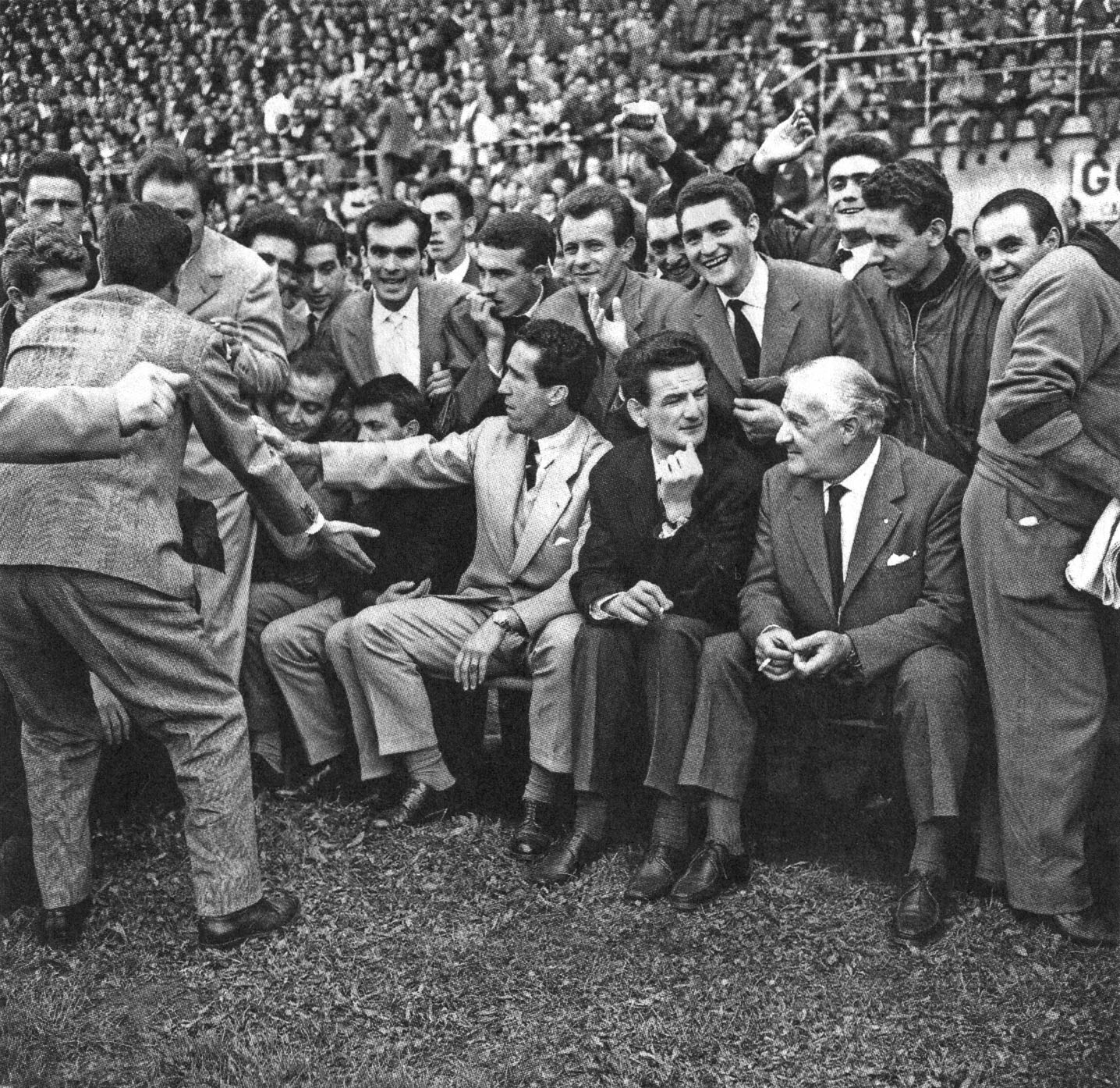 Milano, stadio San Siro, 1961. L'allenatore dell'Inter, il franco-argentino Helenio Herrera (al centro col vestito chiaro), attorniato da un gruppo di tifosi nerazzurri.